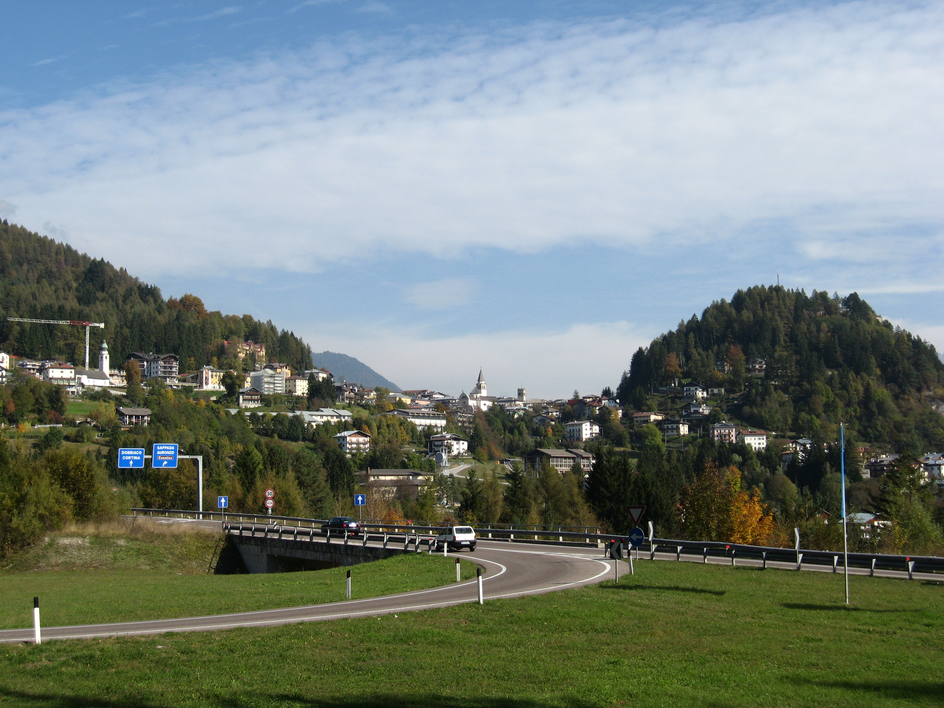 Panorama di Pieve di Cadore dallo svincolo SS51-SS51bis.